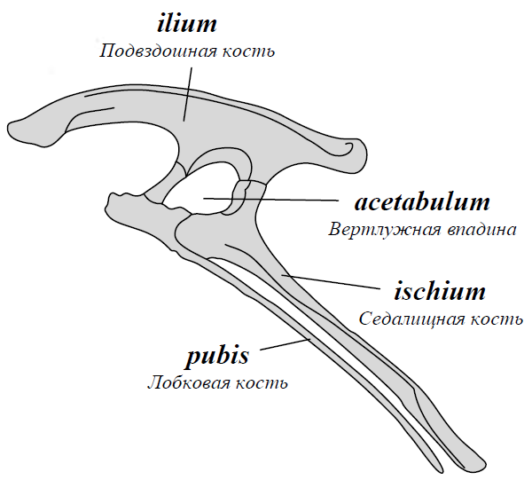 Таз птицетазового динозавра (вид слева, все кости парные, в вертлужную впадину входит головка тазобедренного сустава, позвоночник проходит горизонтально между правой и левой половинами таза на уровне вертлужной впадины)